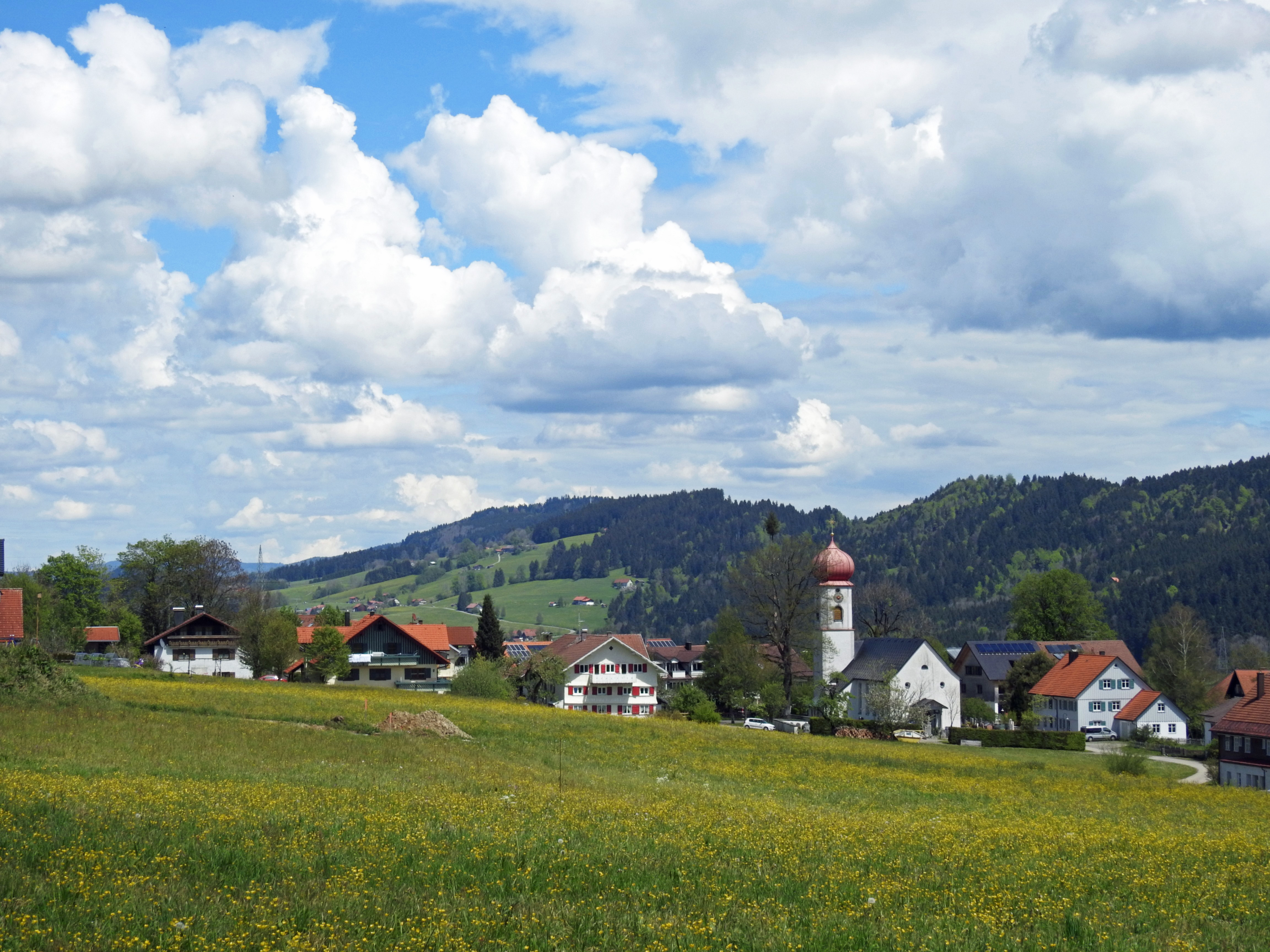 Scheffau (Deutschland, Bayern, Landkreis Lindau, Gemeinde Scheidegg)